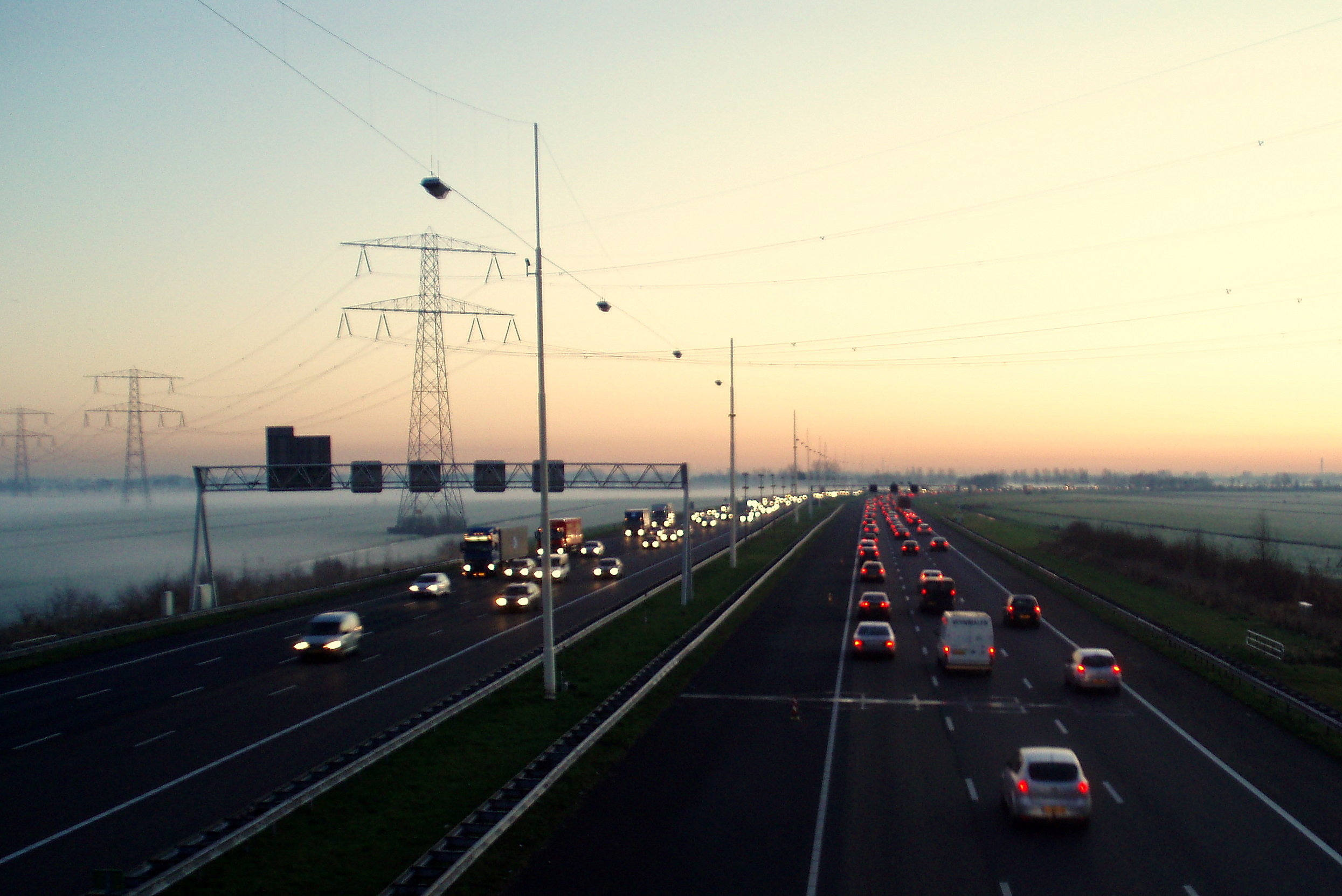 De A12 in de ochtendmist, gezien van het viaduct Cattenbroek.